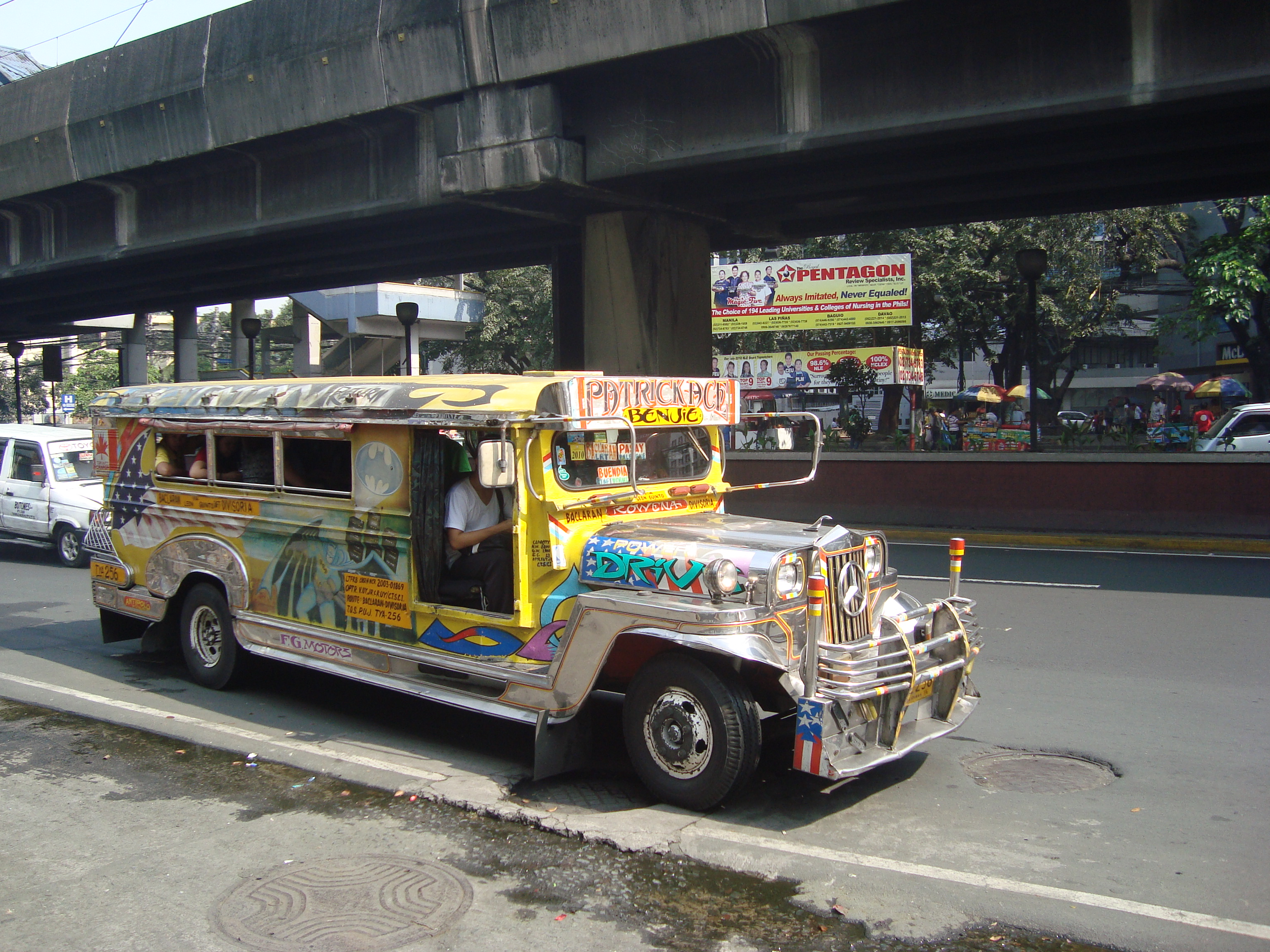 Jeepney in Manila, Philippines